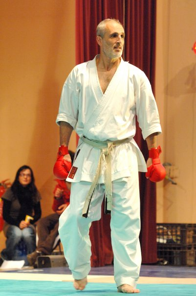 Jacques Tapol se préparant à un combattant d'entrainement avec protections lors d'une démonstration à Lodève